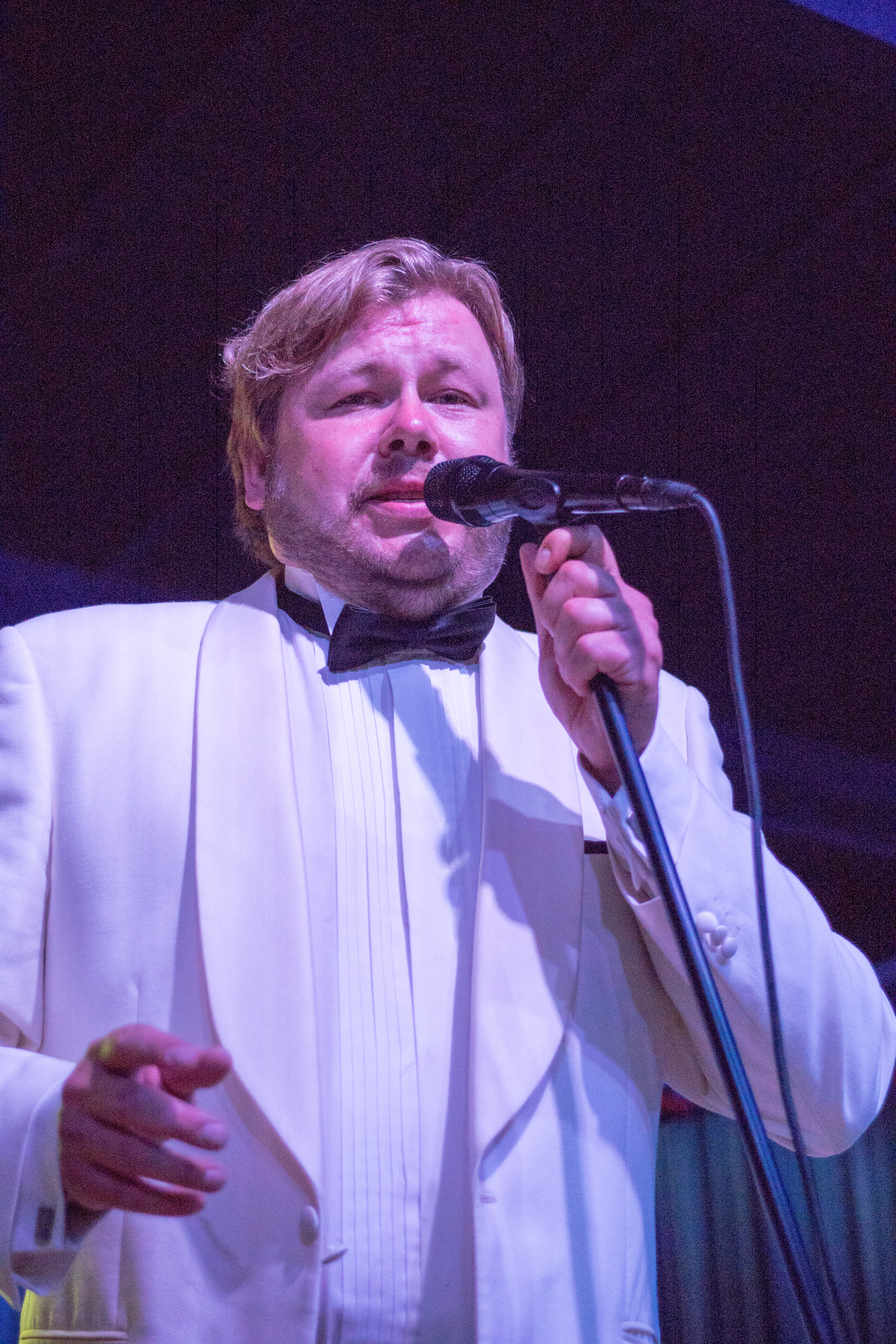 Juha Hostikka suomalainen laulaja